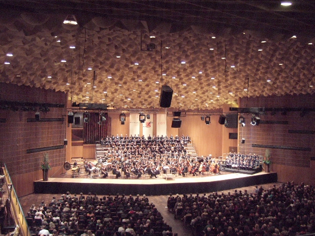 Beethovenhalle, Bonn – Innenansicht